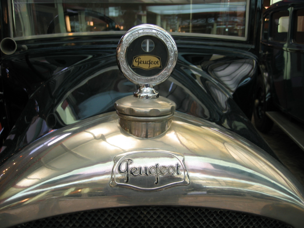 Peugeot Type 153 - Musée Peugeot Sochaux